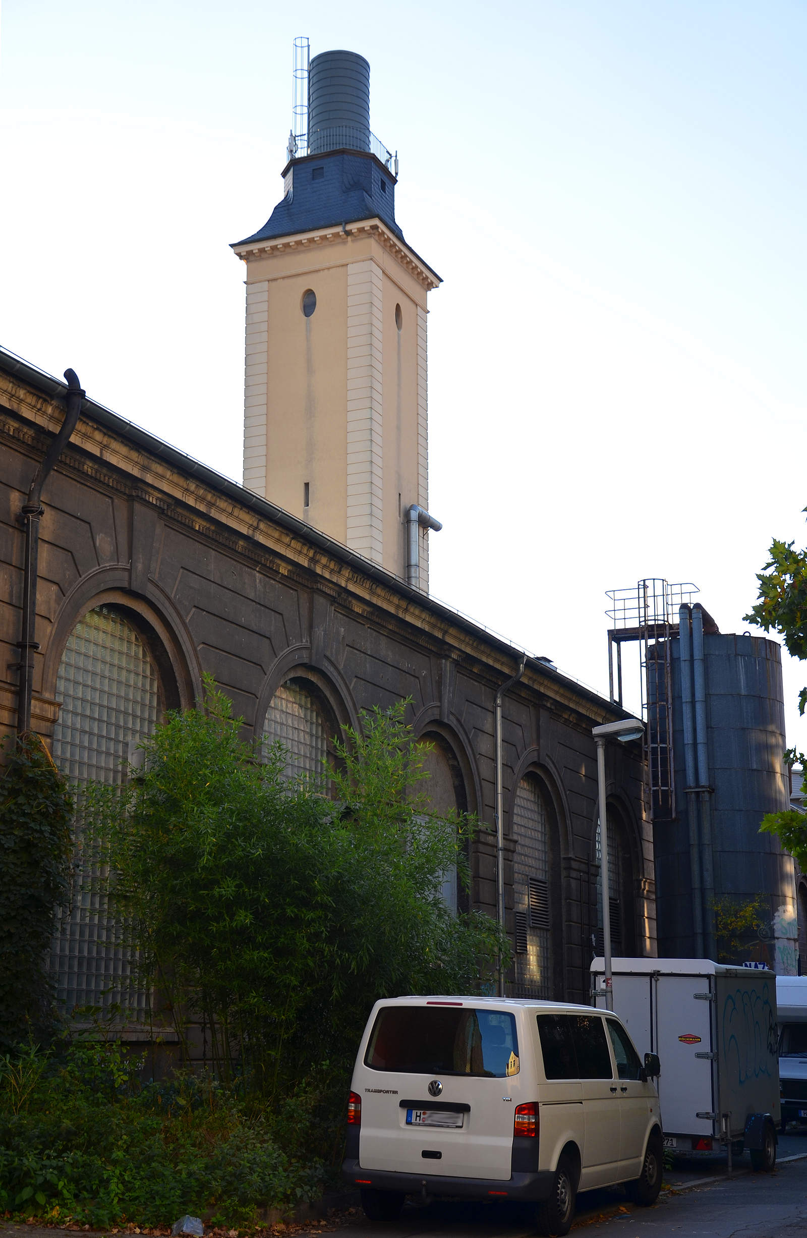 Hannover-Nordstadt, Blick durch die Straße Am Puttenser Felde auf die Putz-Fassade mit den großen Rundbogen-Fenstern des 1913 erbauten ehemaligen Maschinen-Ingenieur-Laboratoriums. Das Gebäude diente später als Heizkraftwerk der Universität Hannover, von dem hier noch der Turm zu sehen ist. Heute sind in dem Gebäude (hier von der Rückseite zu sehen) mit seinen neueren Anbauten das Institut für Technische Verbrennung ( ITV), das Institut für Maschinenkonstruktion und Tribologie IMKT) und das Dezernat 3, Gebäudemanagement der Leibniz Universität Hannover untergebracht. Adresse: Welfengarten 1A (Haupt-Eingänge an den anderen Gebäudeseiten) ...